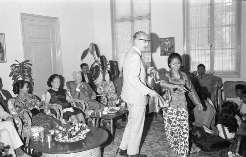 Asienreise von Bundespräsident Lübke. Staatsbesuch des Bundespräsidenten in Indonesien 1963. Tanzvorführung im Tjipanas Palast